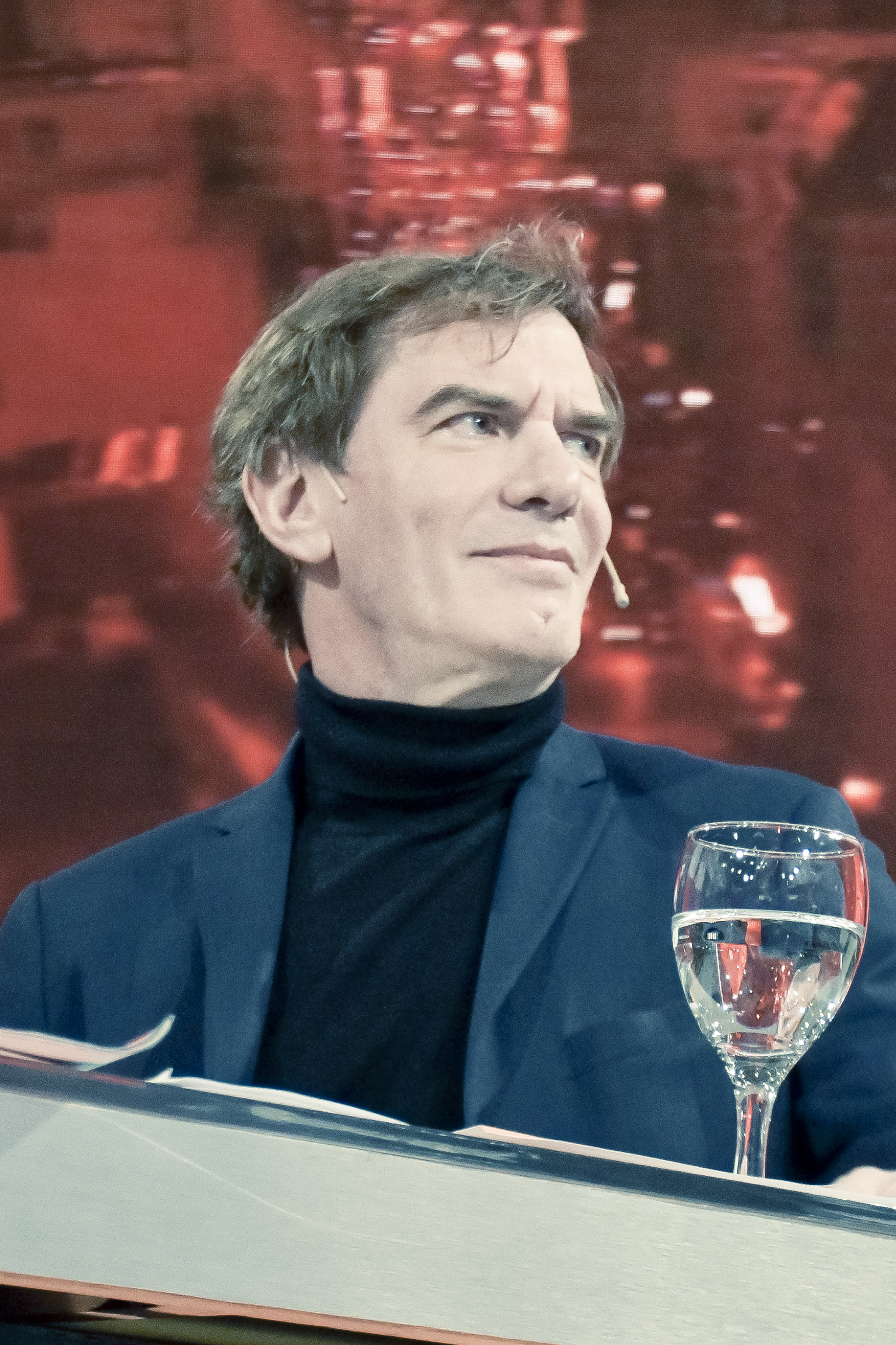 Participación de Darío Lopérfido en el programa televisivo A Dos Voces (2019)